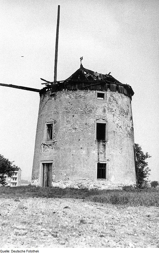 Original image description from the Deutsche FotothekWeißig a. Raschütz. Erdholländer